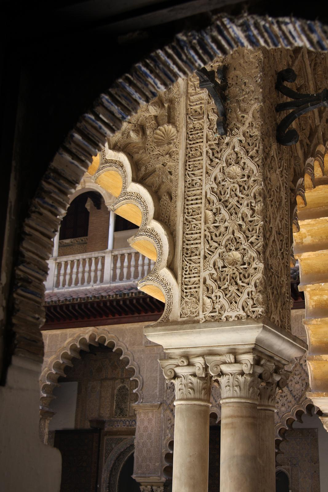 Detalle de arco en el Patio de las Doncellas, Alcázar de Sevilla, España. 2008